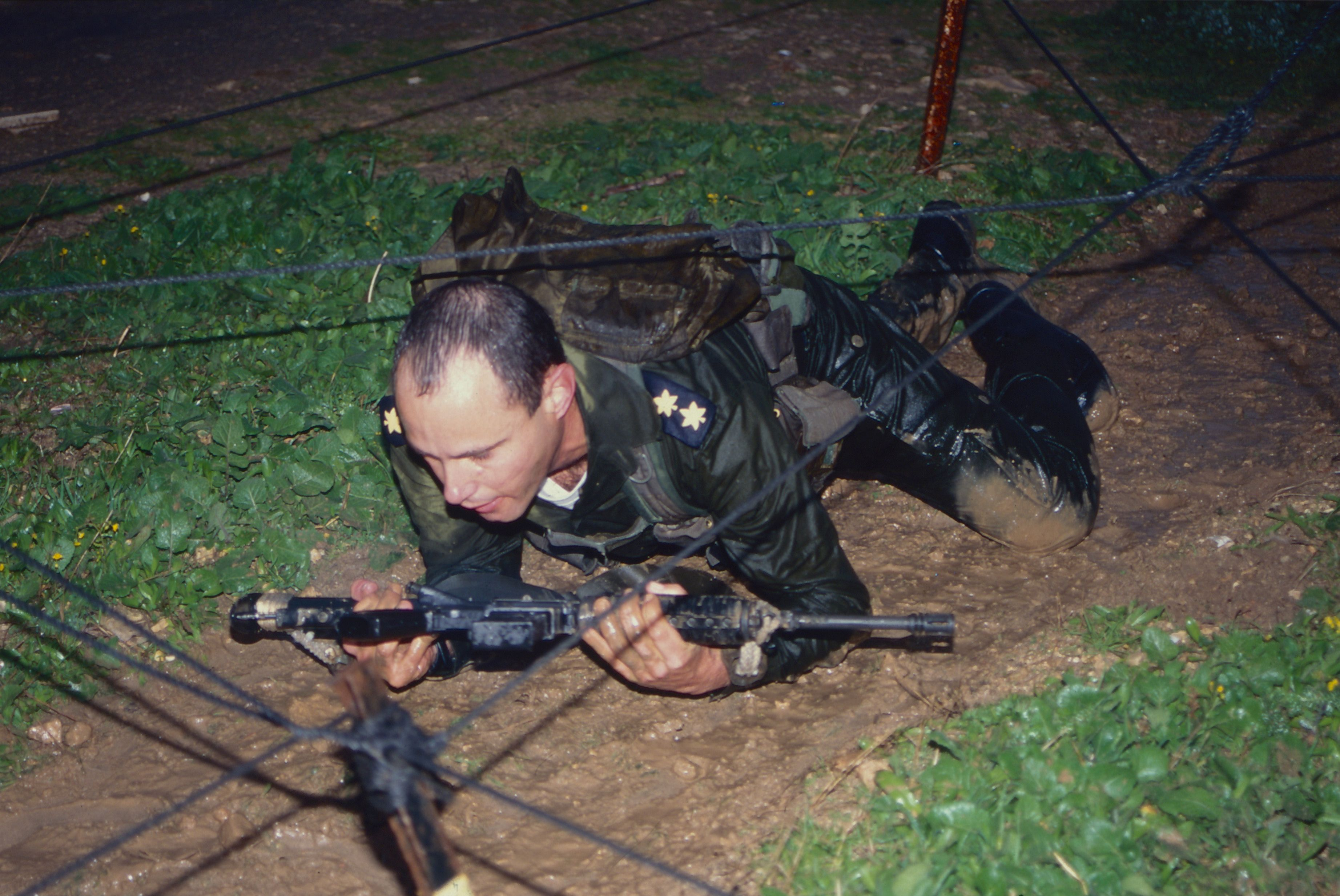 דיסטניק